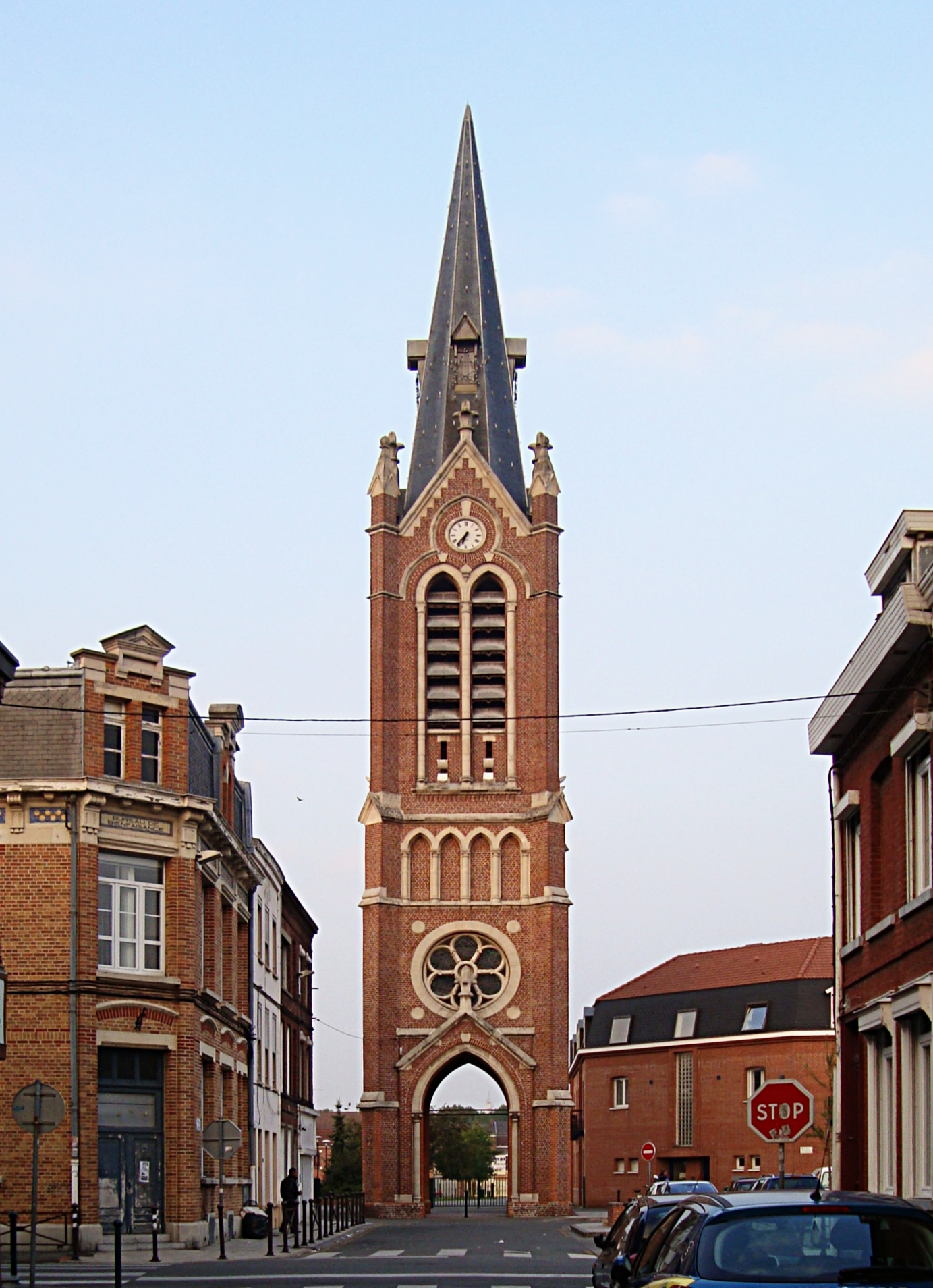 La tour-clocher de l'église du Saint-Sépulcre à Lambersart (Nord). Il a été construit en 1899 par l'architecte Henri Boudin (1851-1912). Le reste de l'église, construite entre 1865 et 1874 par l'architecte Charles Maillard, a été démoli en 1993.